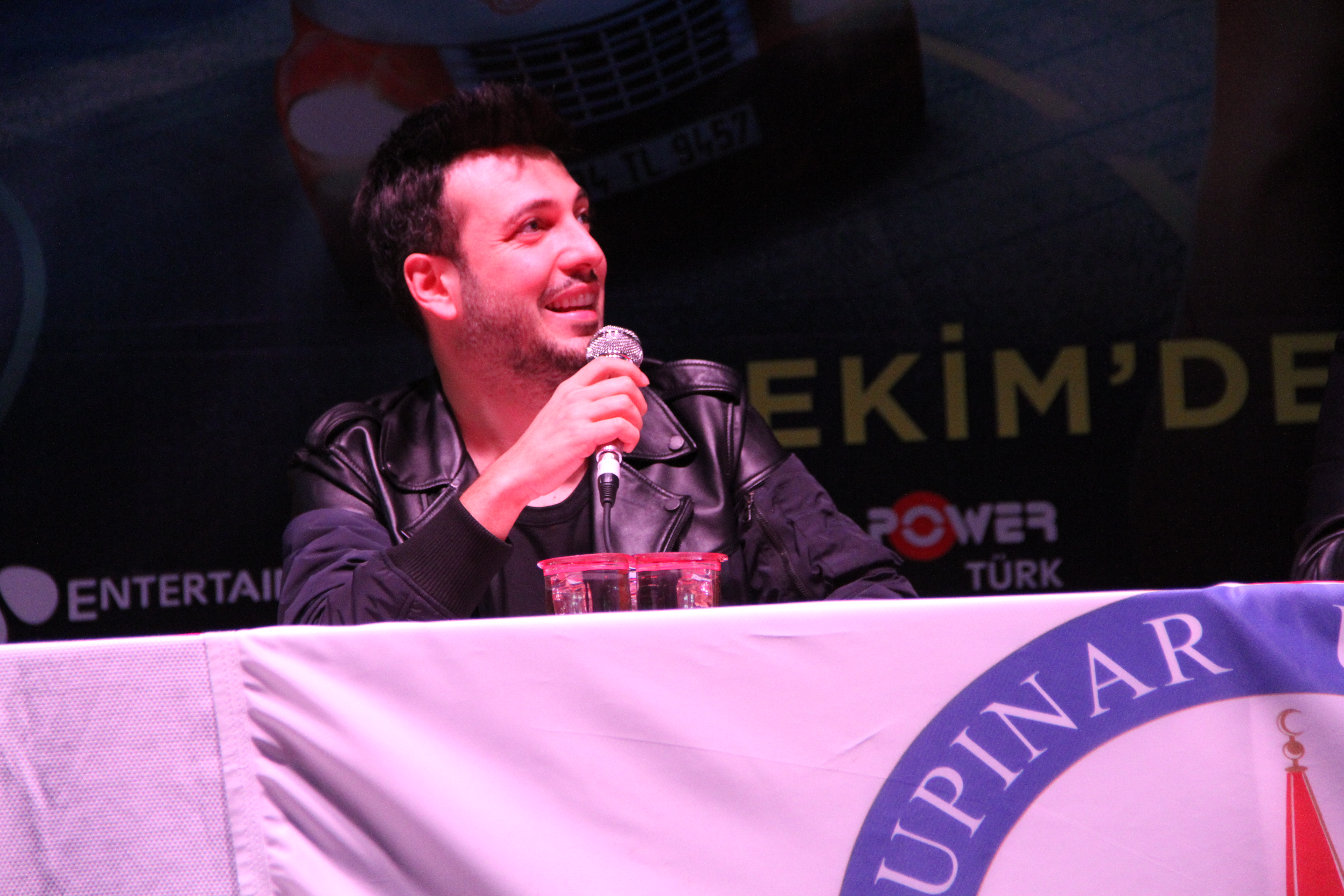 Oyuncu, müzisyen Oğuzhan Koç, Kütahya Dumlupınar Üniversitesinde katıldığı bir söyleşide.